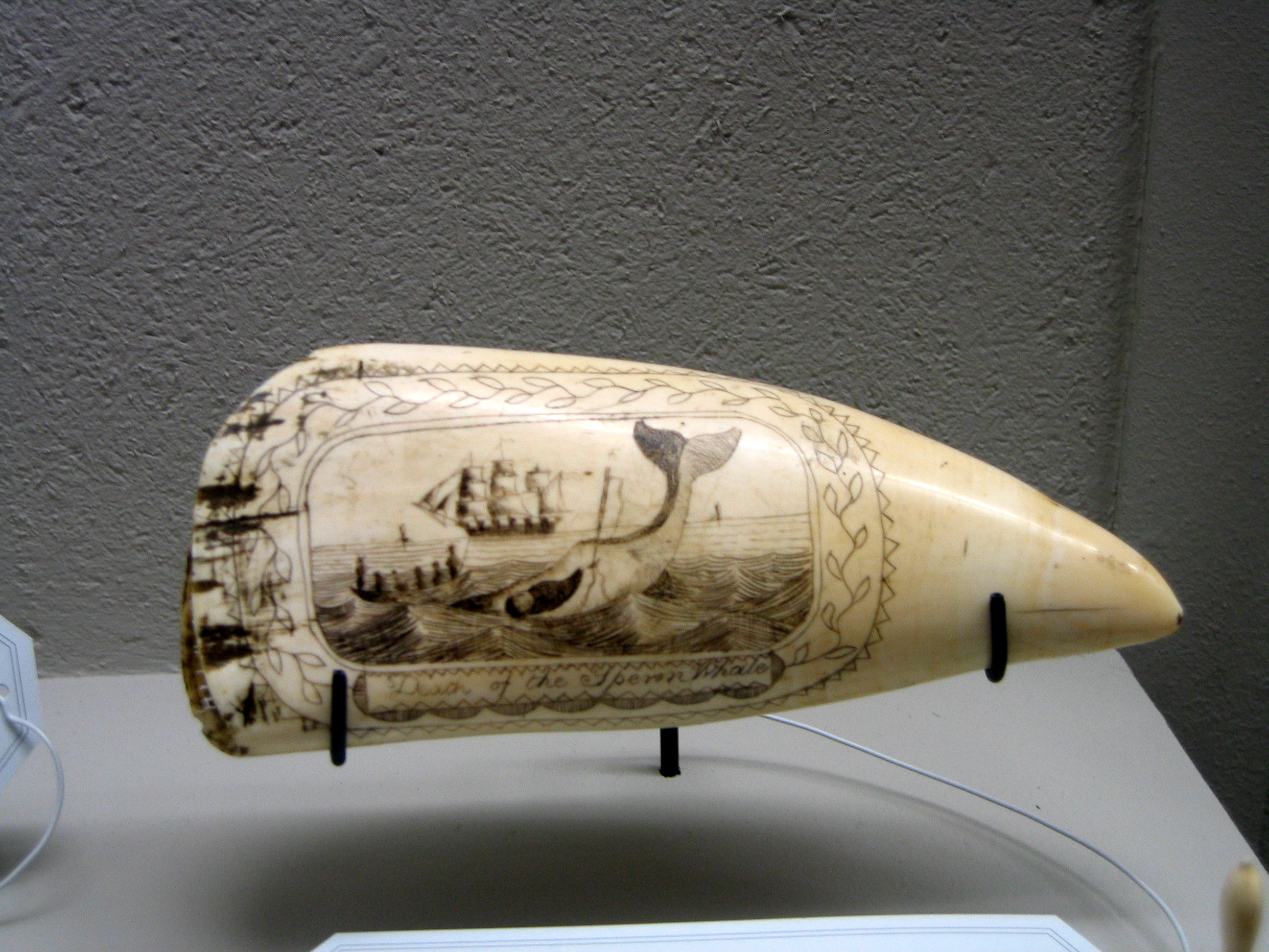 Une dent de cachalot gravée